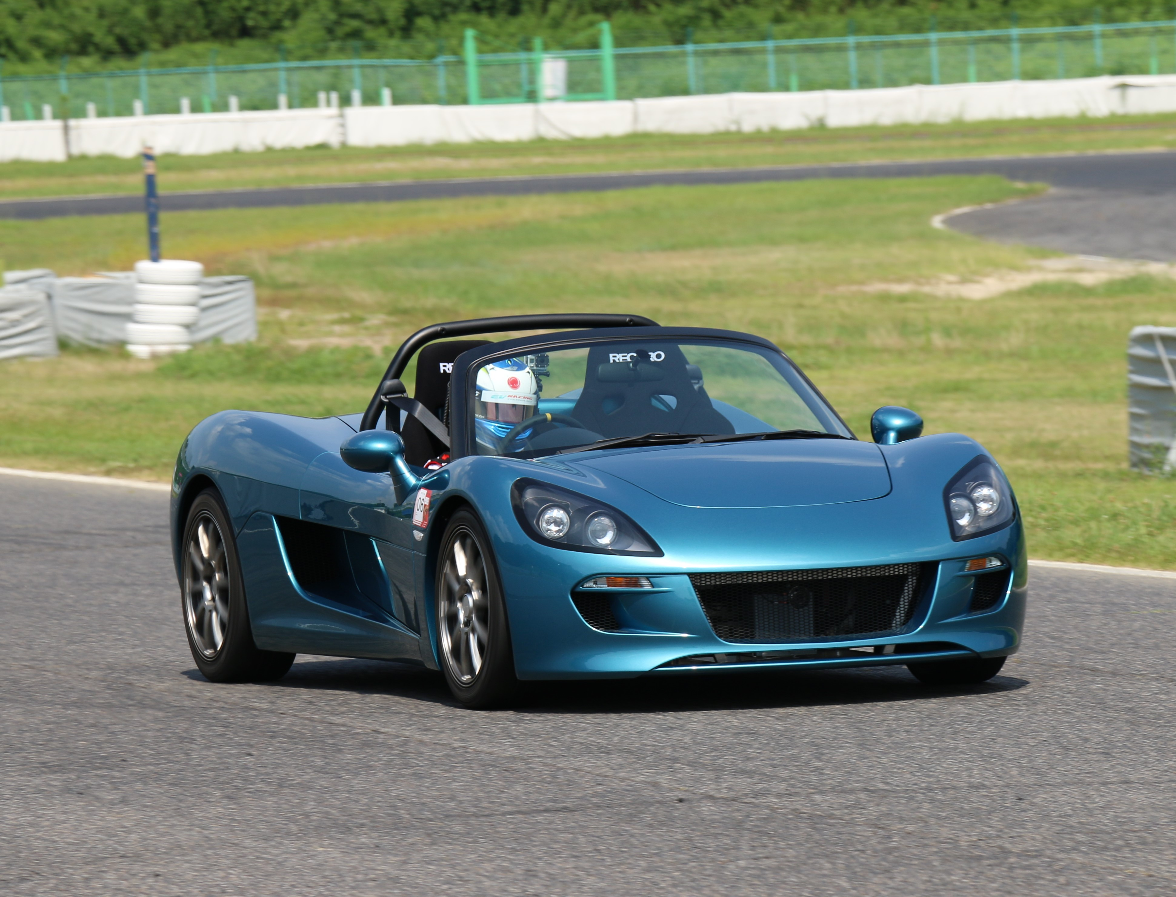 サーキットを走るトミーカイラZZ